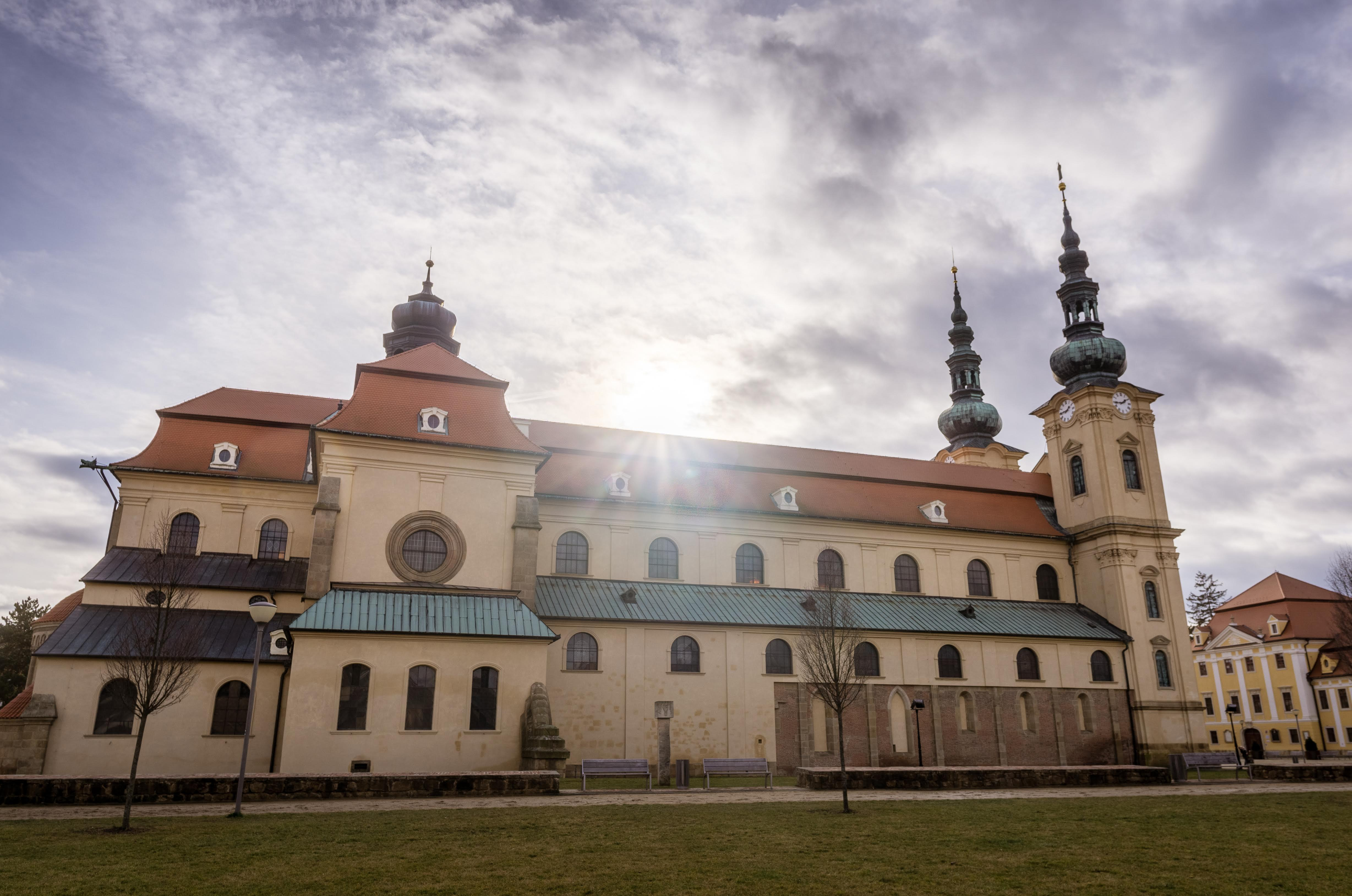 Boční pohled na baziliku (únor 2020)